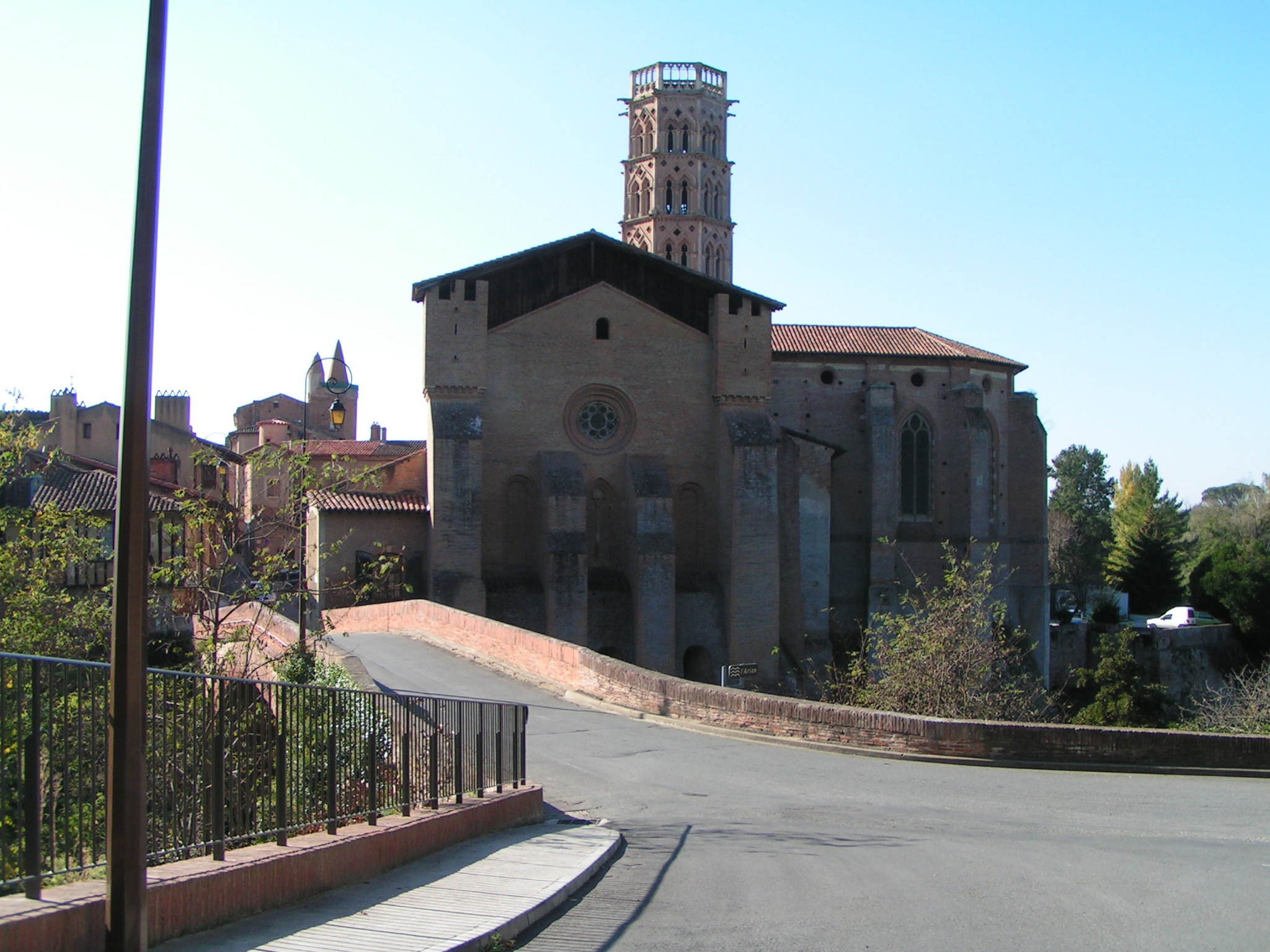 Cathédrale de Rieux-Volvestre (Haute-Garonne, France).